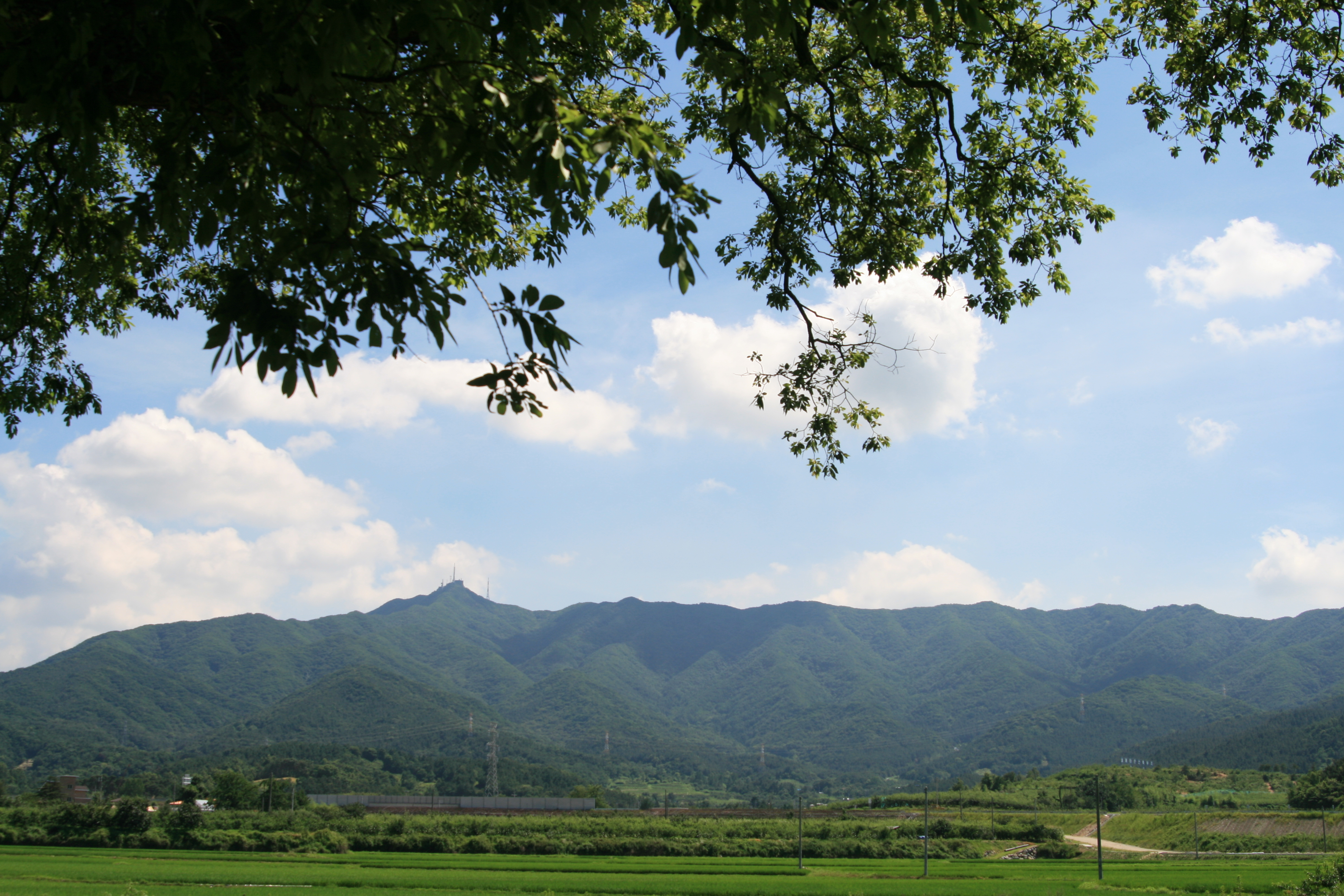 모악산의 여름 풍경.